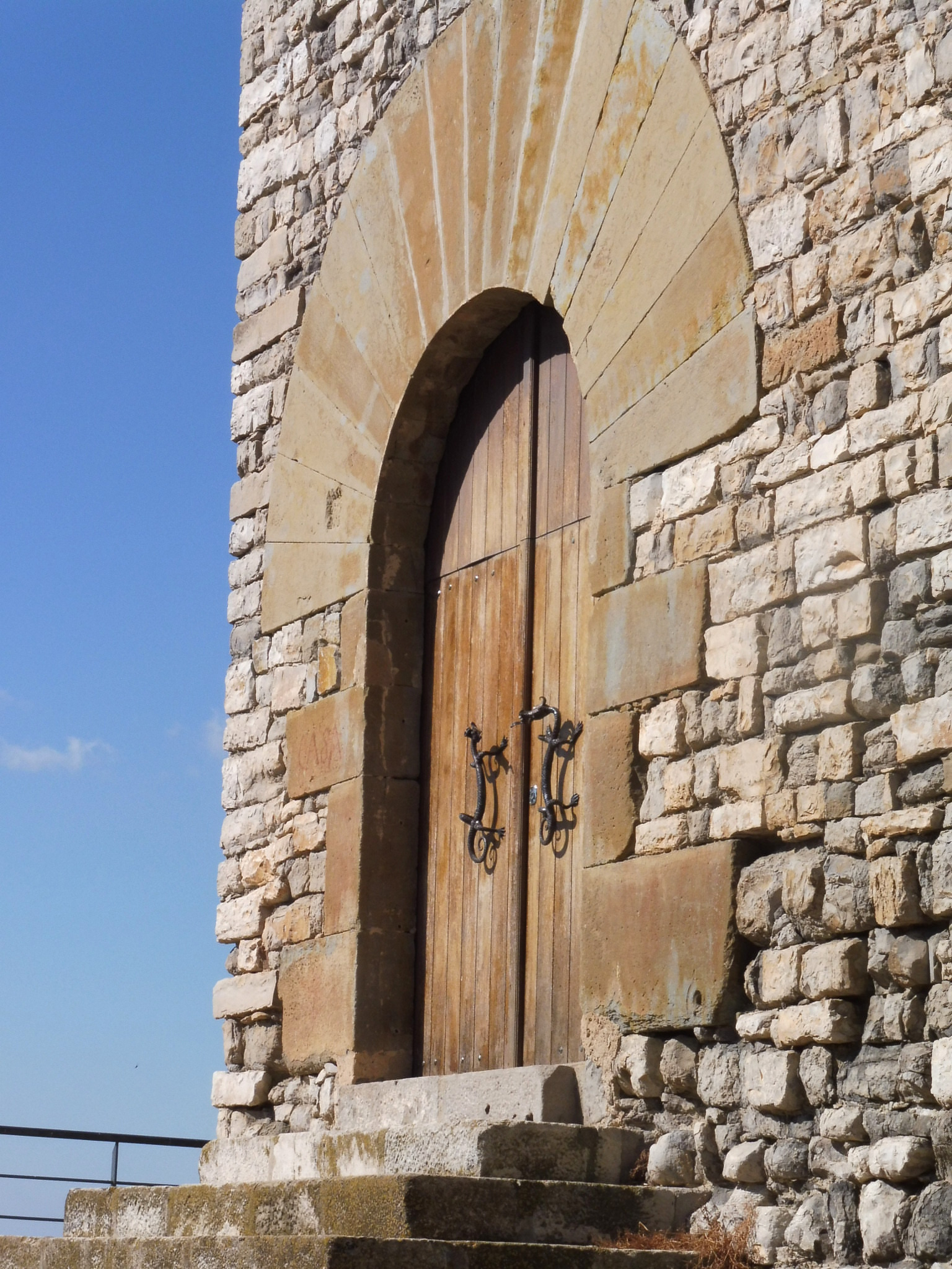 Castell de la Curullada (Granyanella): portal